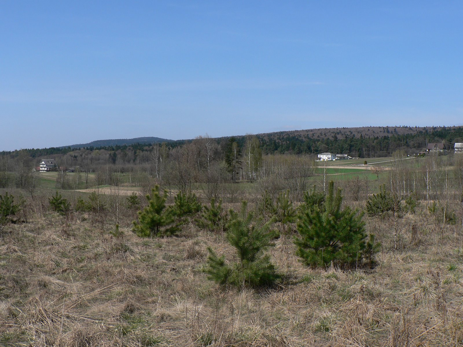 Łysica z Podlesia